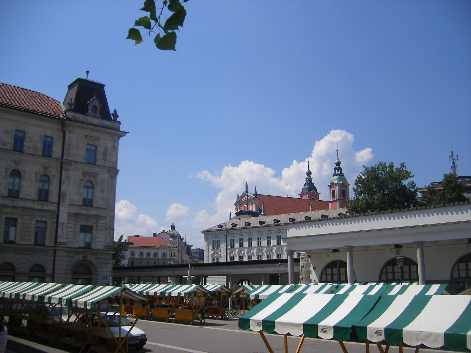 Ljubljana - Vodnikov Trg